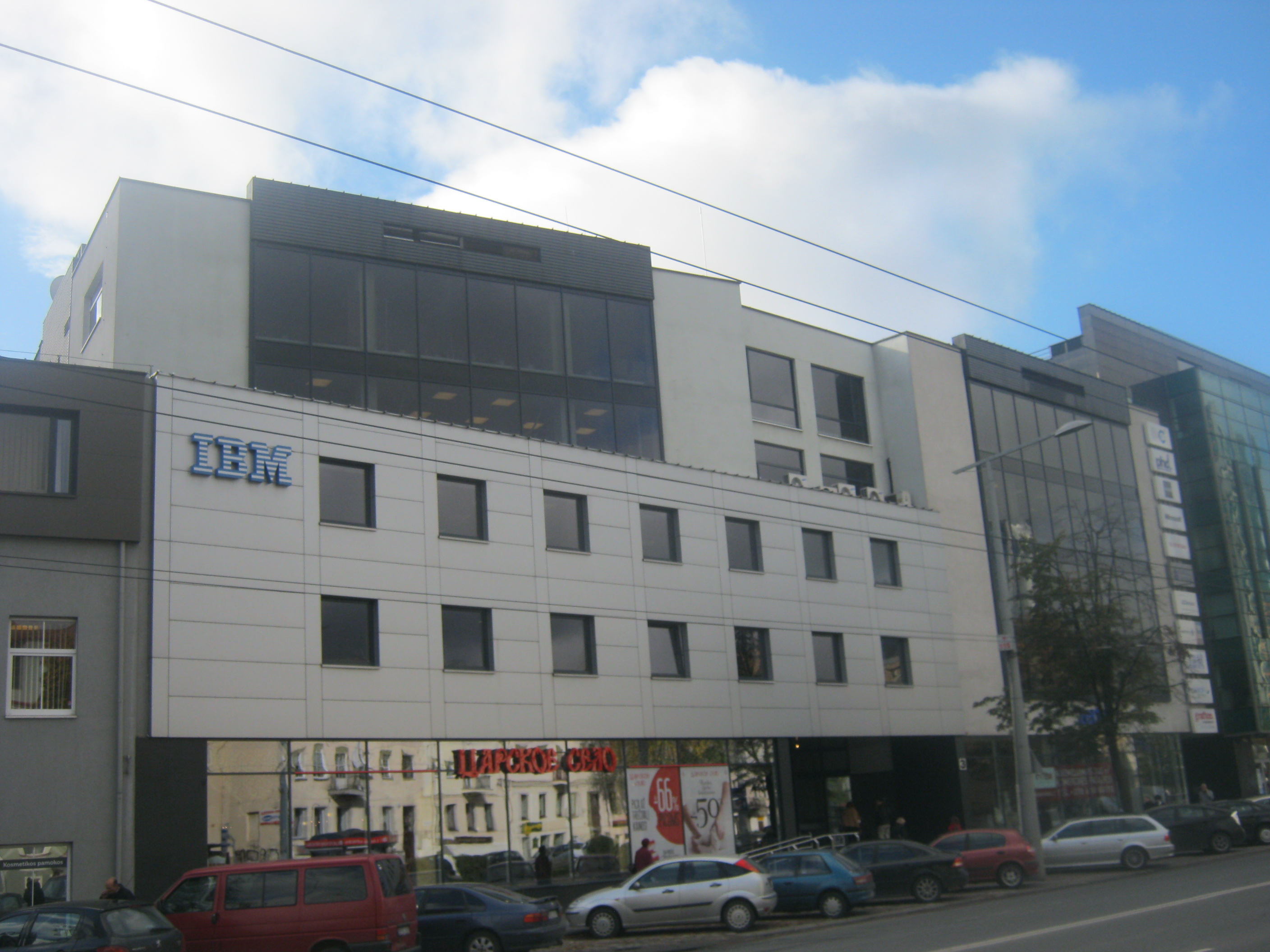 Vilnius